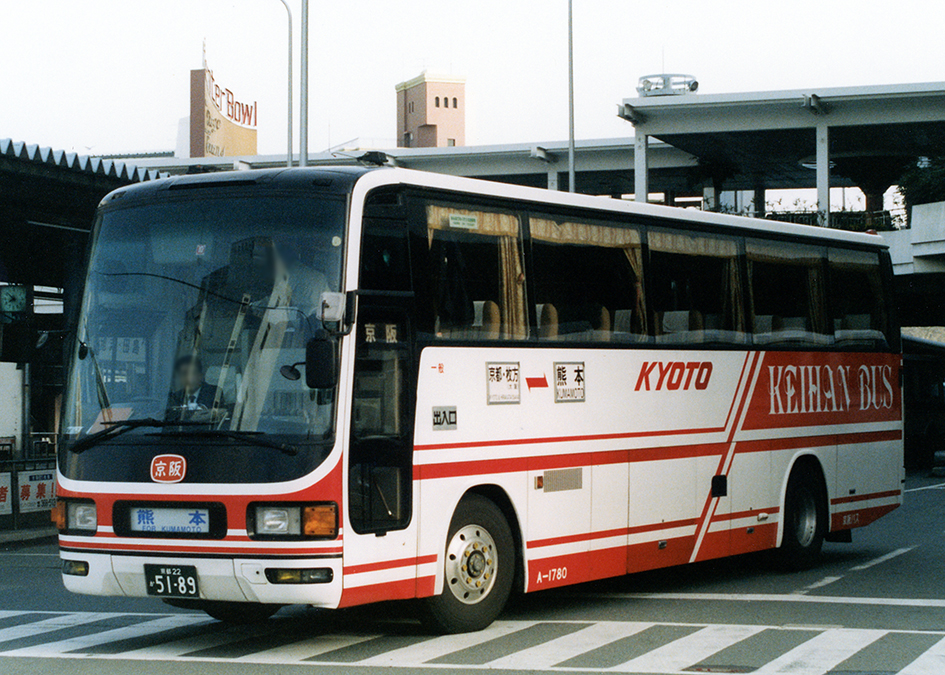 京阪バス きょうと号 京都・枚方－熊本線 三菱ふそう・エアロクィーンM U-MS729S